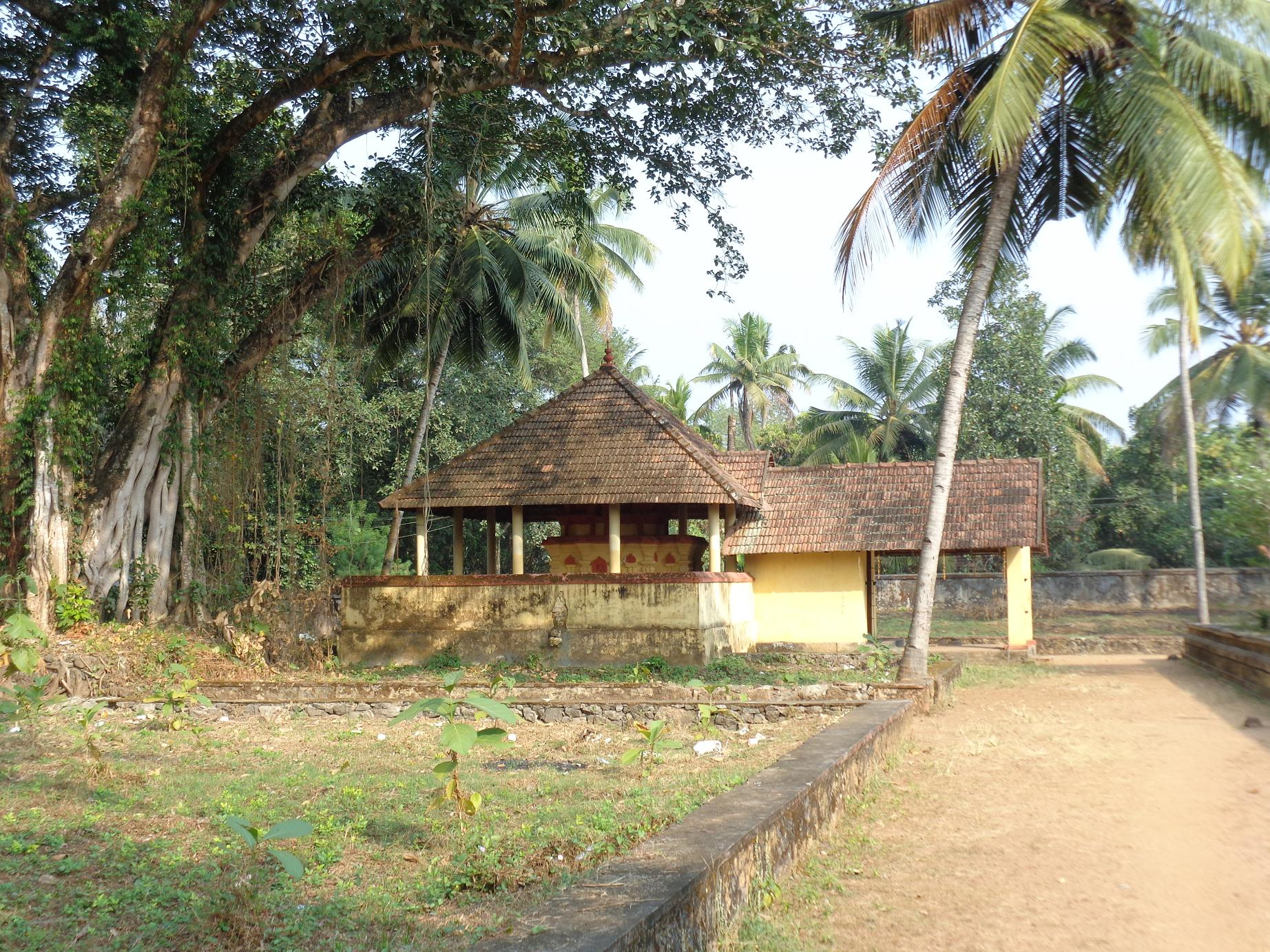 തൃച്ചിറ്റാറ്റ് ക്ഷേത്രത്തിലെ ഗോശാലകൃഷ്ണന്റെ കോവിൽ